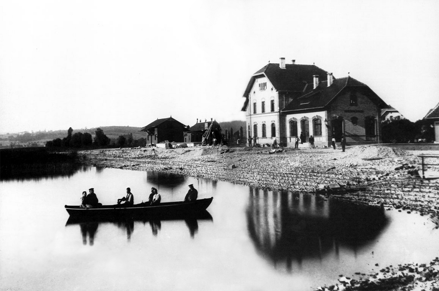 Bahnhof im Unteruhldingen während der Bauzeit